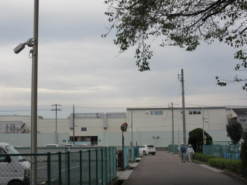 岐阜車体工業